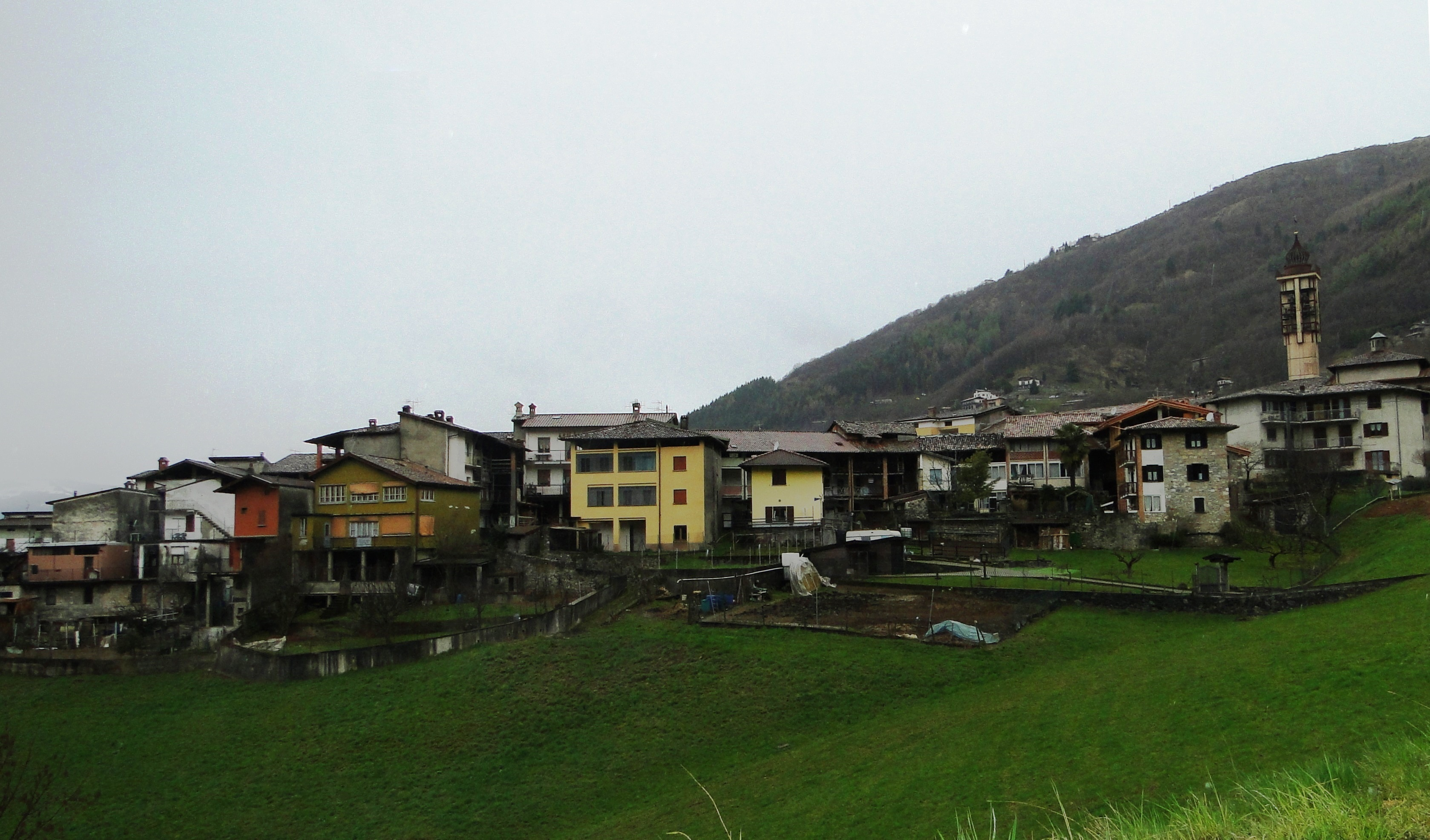 Cirano, fraz. di Gandino (BG). Panorama